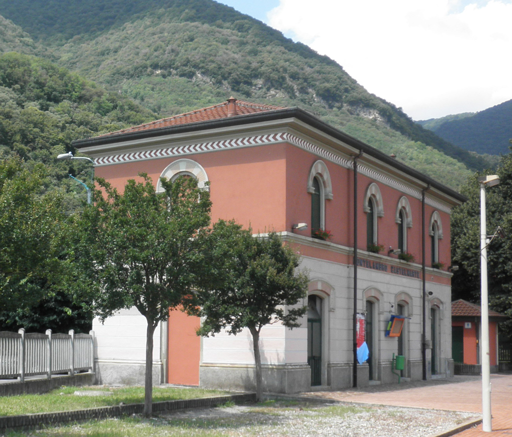 Stazione ferroviaria di Pontelambro-Castelmarte